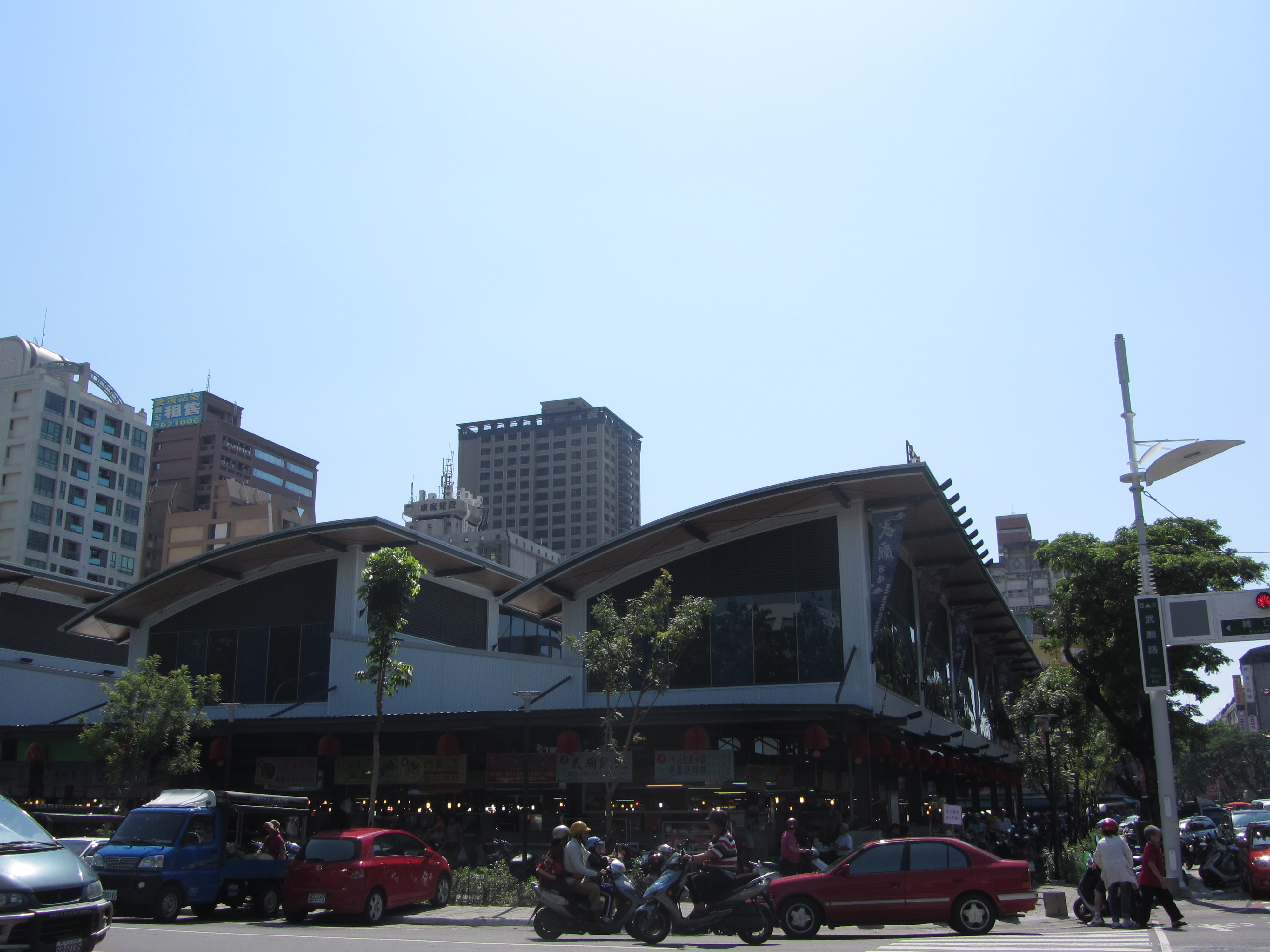 高雄市苓雅區武廟市場